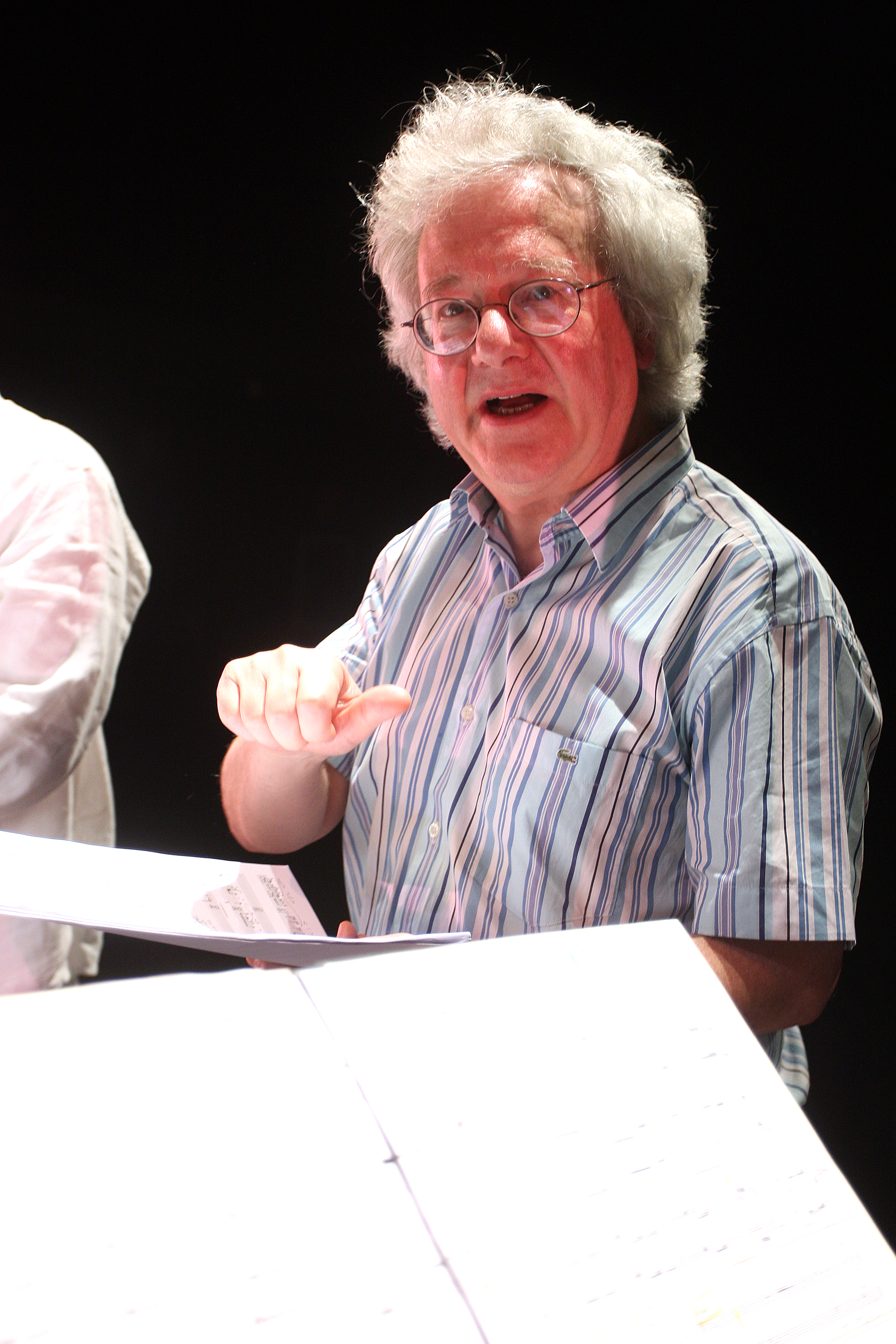 Felix Ibarrondo (Musikaste 2011)